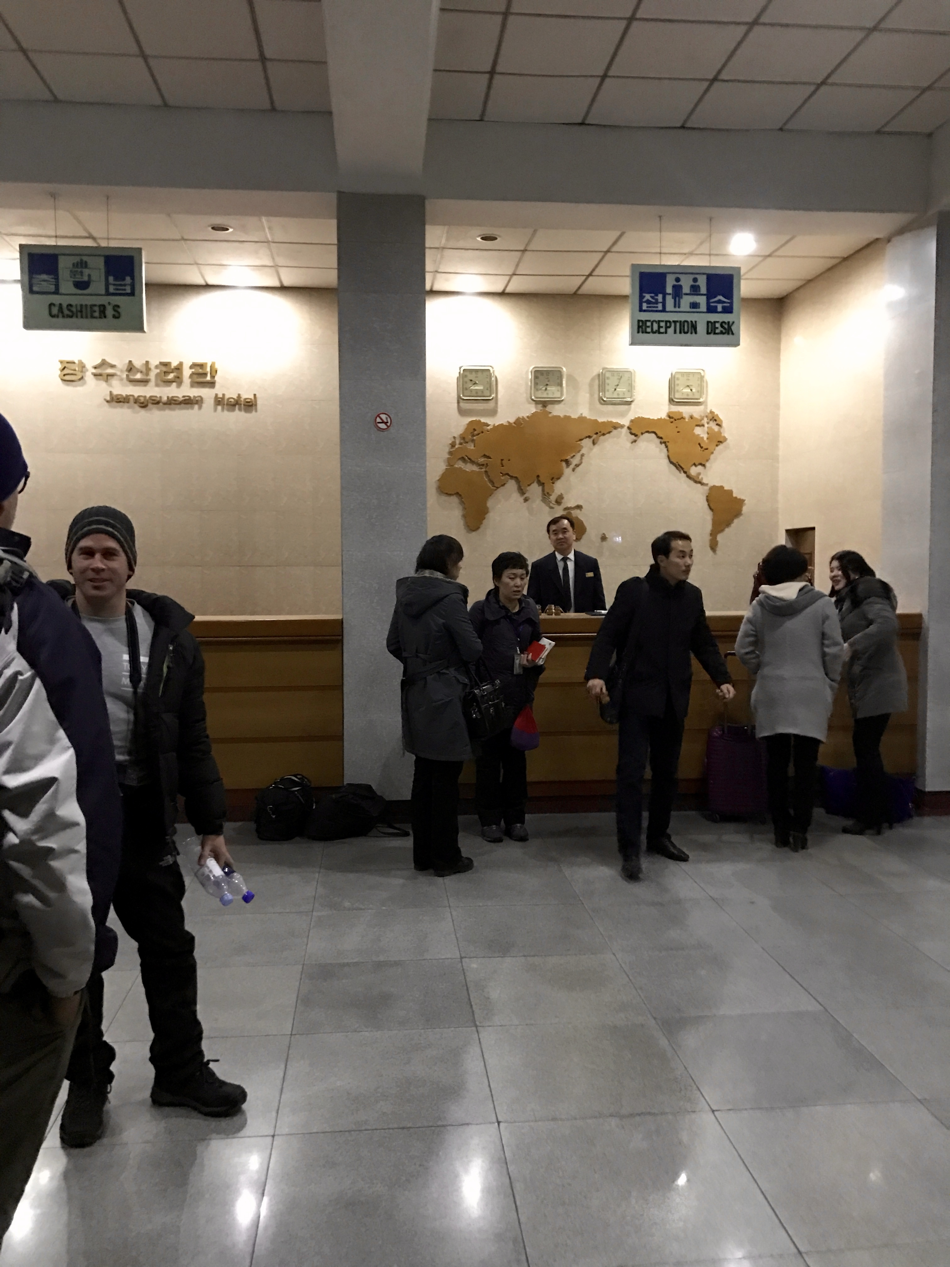 Jangsusan Pyongsong